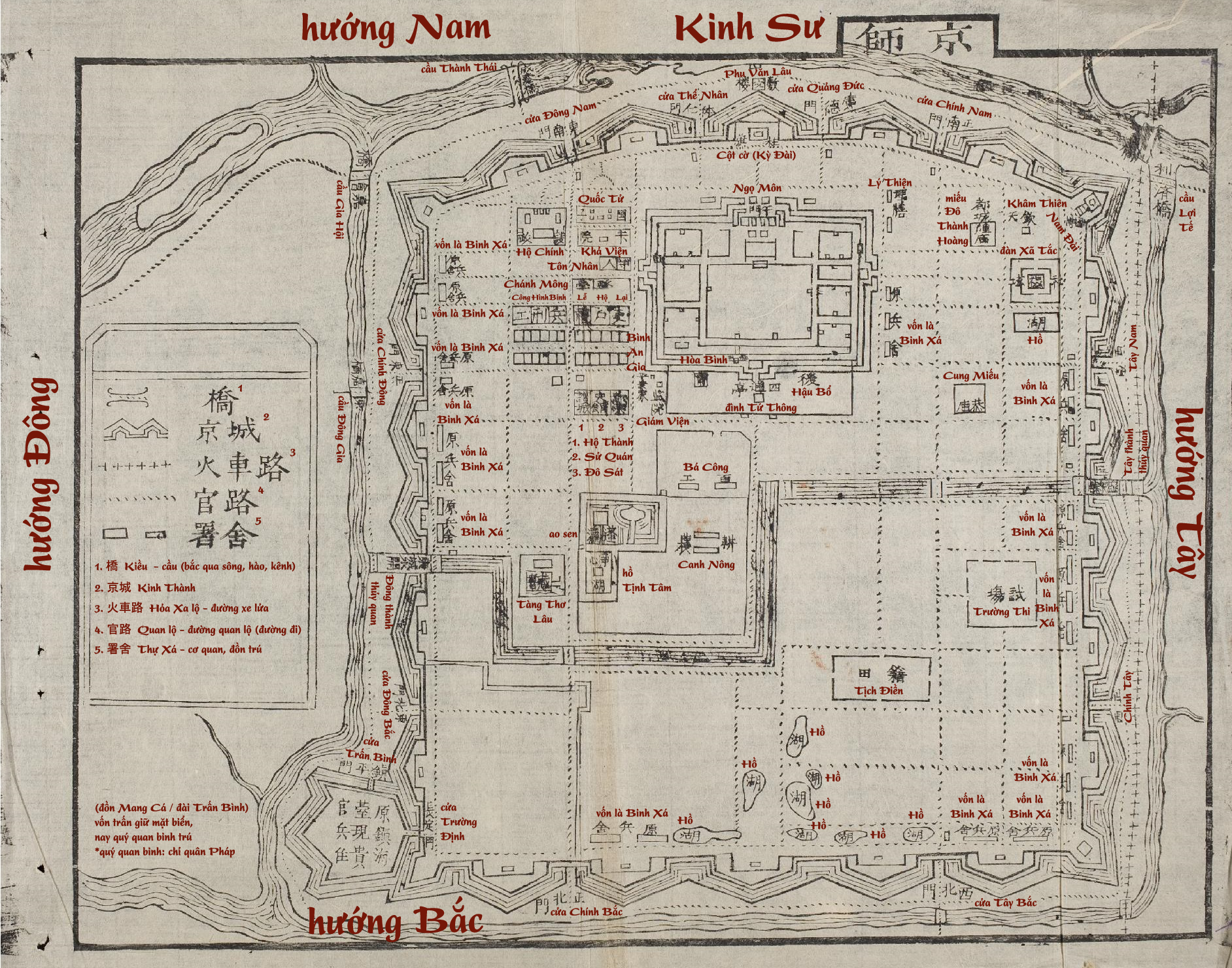 Kinh sư Huế - bản Việt hóa với hướng Nam nằm bên trên như được vẽ trong bức bản đồ gốc. Bức bản đồ này nằm trong bộ bản đồ Đại Nam Nhất Thống Chí